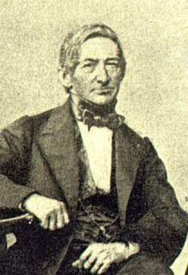 Мори, Ф., соучредитель Санкт-Петербургского частного коммерческого банка